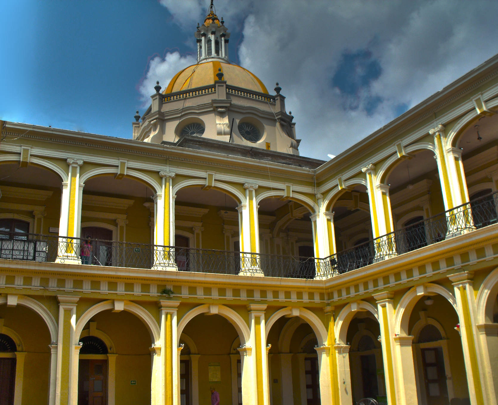 Palacio Municipal